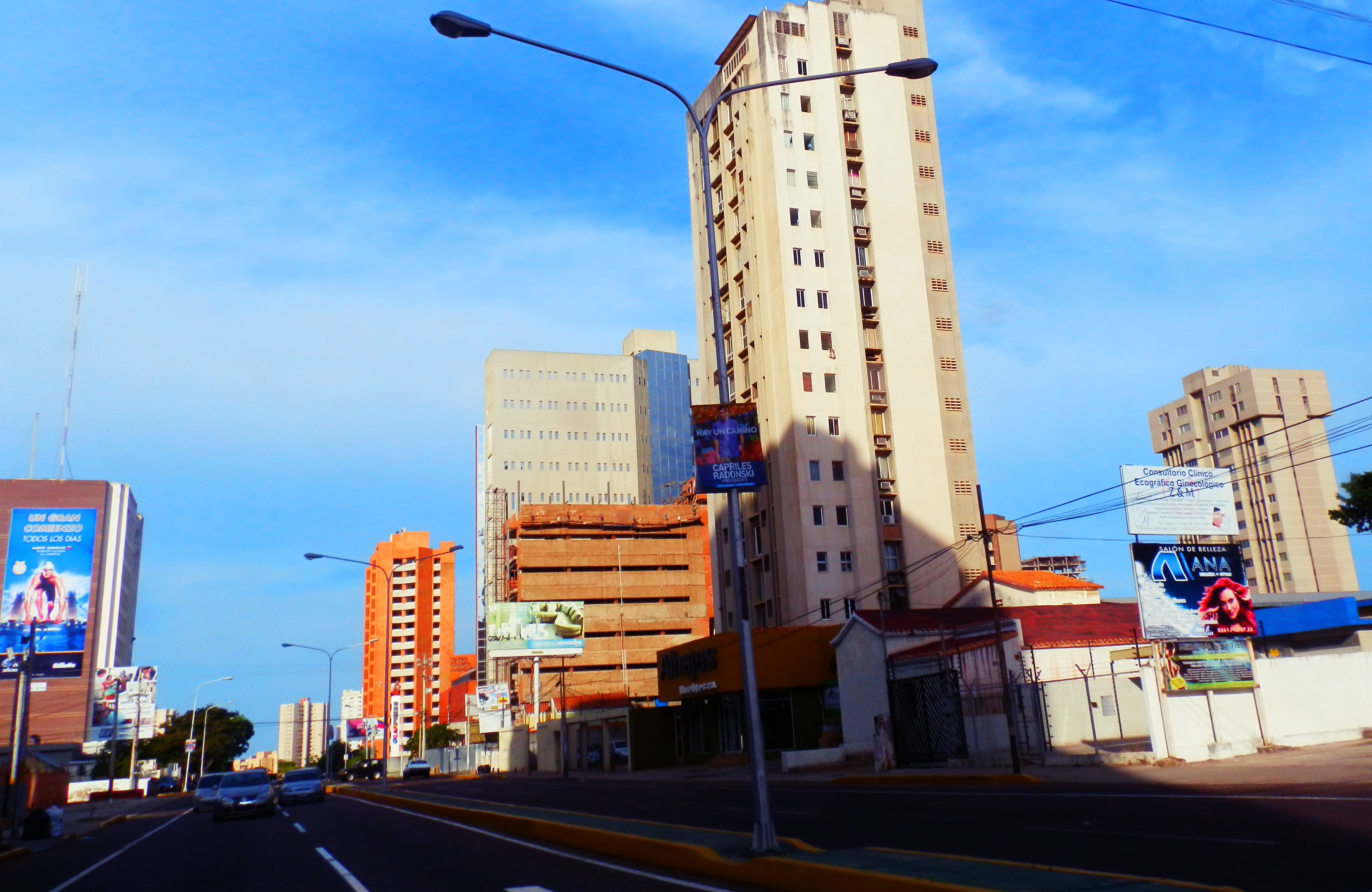 Edificios en Maracaibo